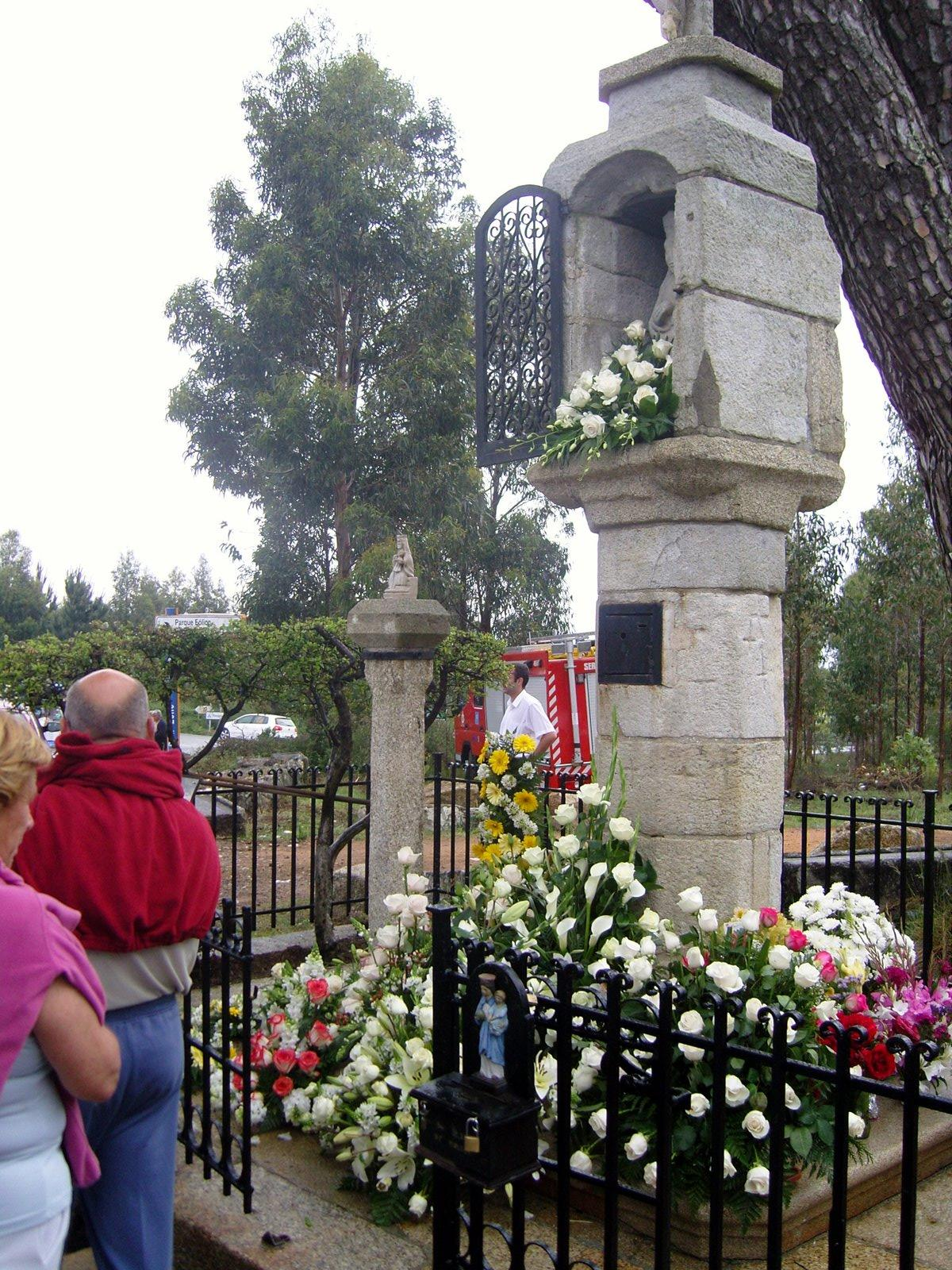 Cruceiro de Moldes, A Pobra do Caramiñal